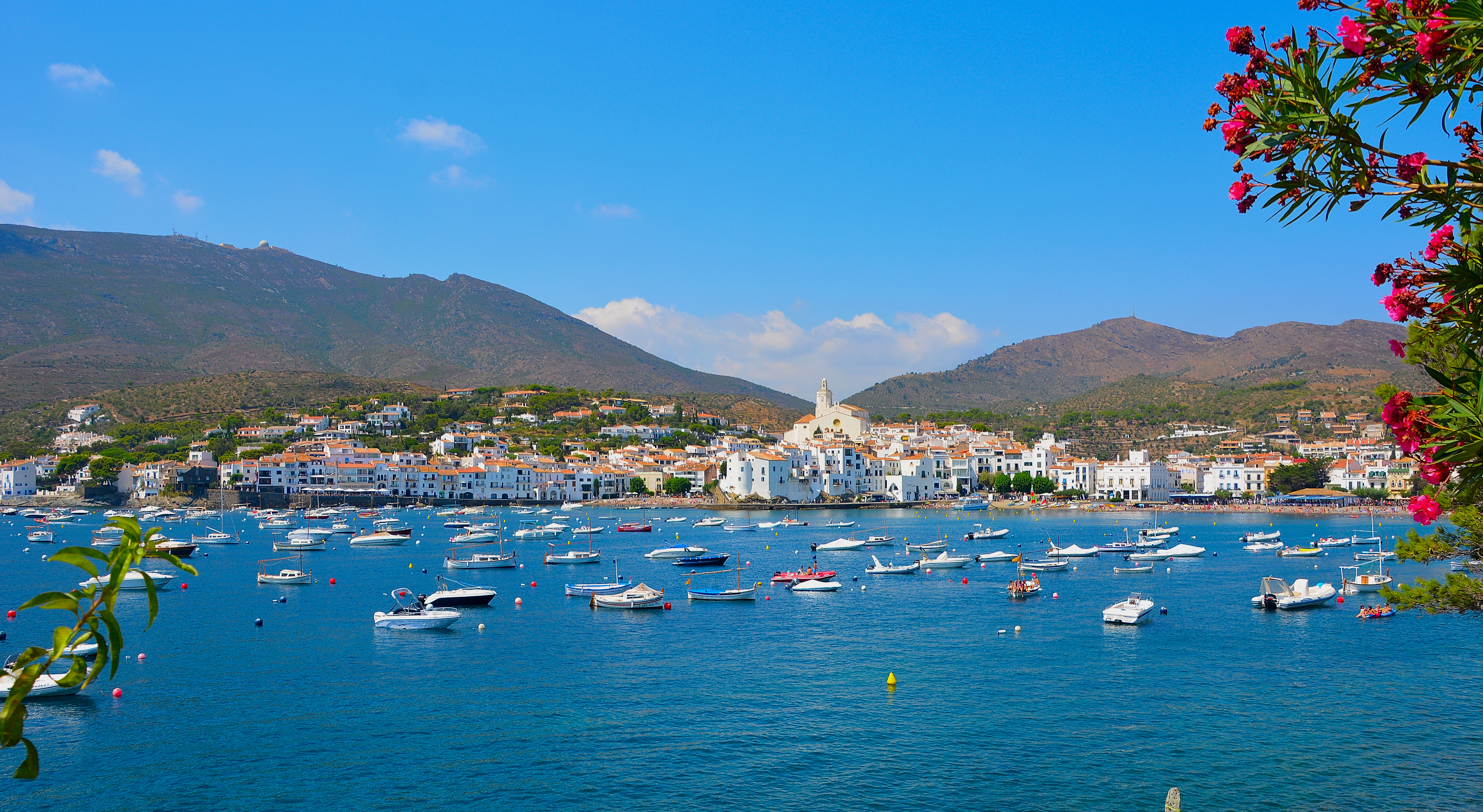 Cap de Creus - Cadaques, unos de los pueblos mas hermosos de la Costa Brava. This is a photography of a Special Area of Conservation in Spain with the ID: ES5120007. Natura2000 entry, EEA entry